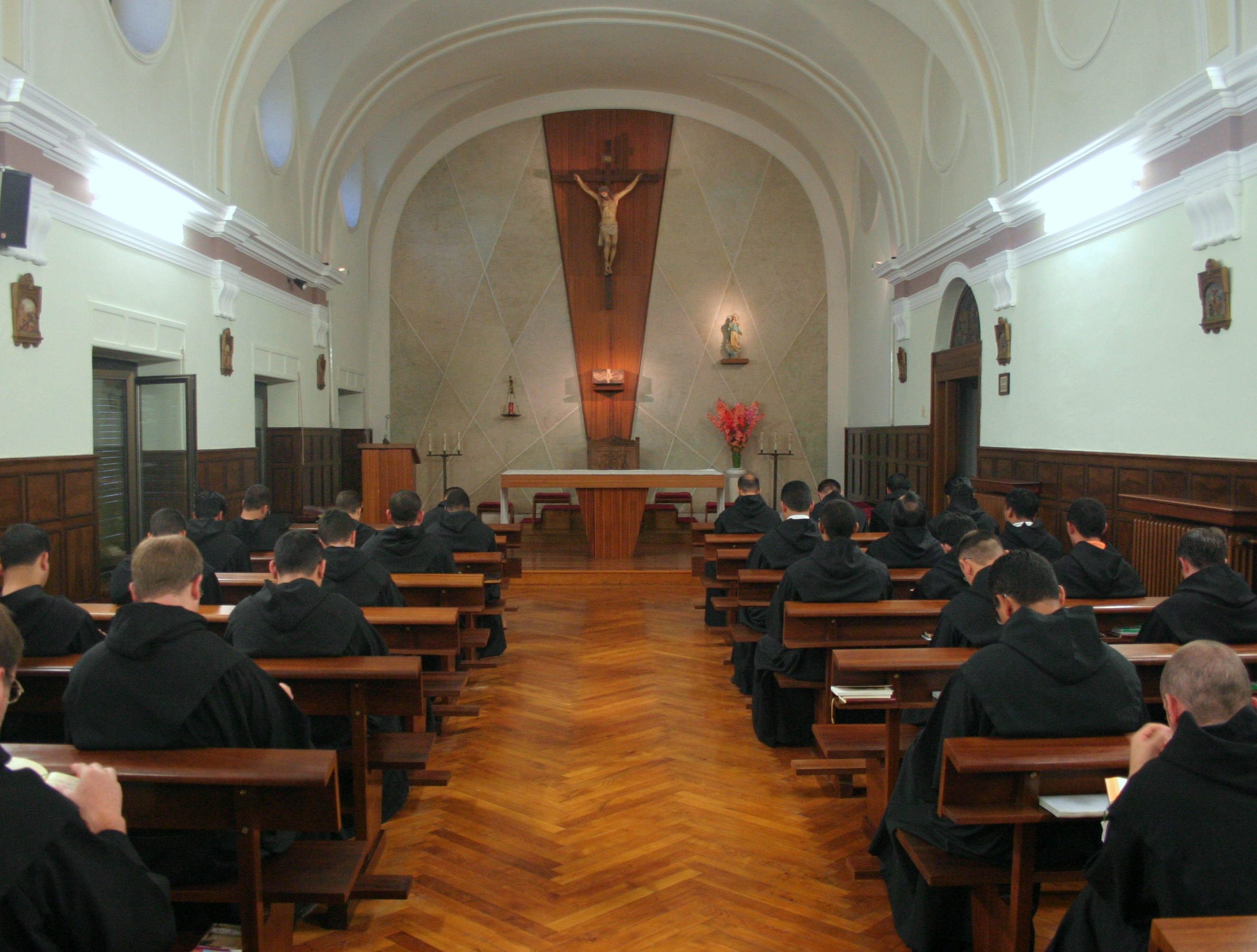 Agustinos Recoletos en oración.